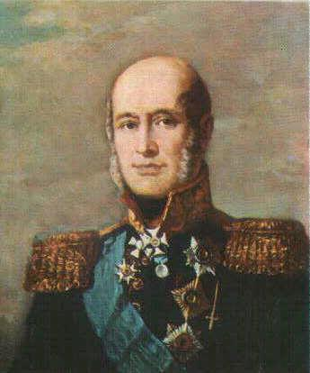 detail Portrait